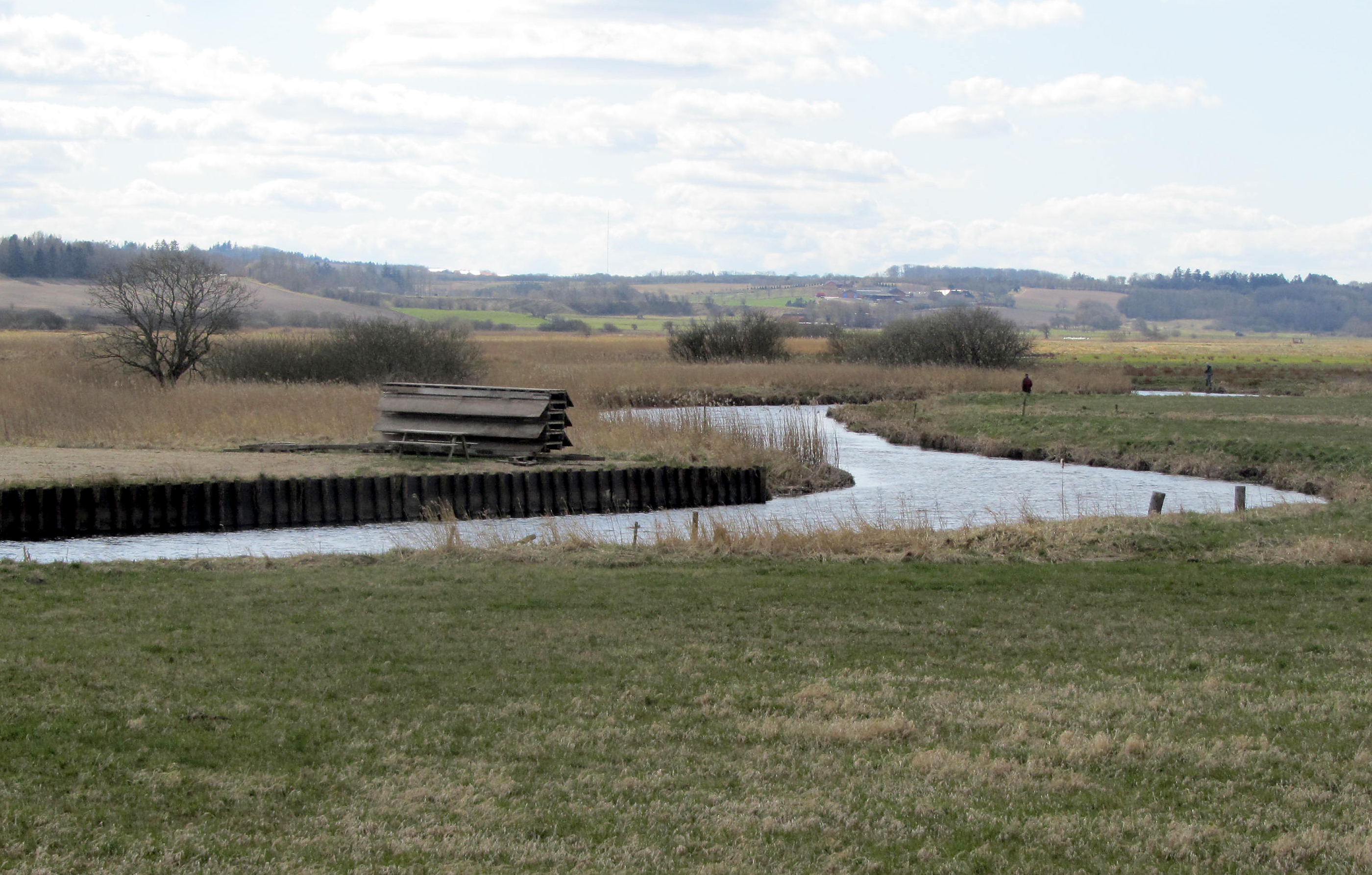 Skals Å ved Skals bro syd for byen Skals